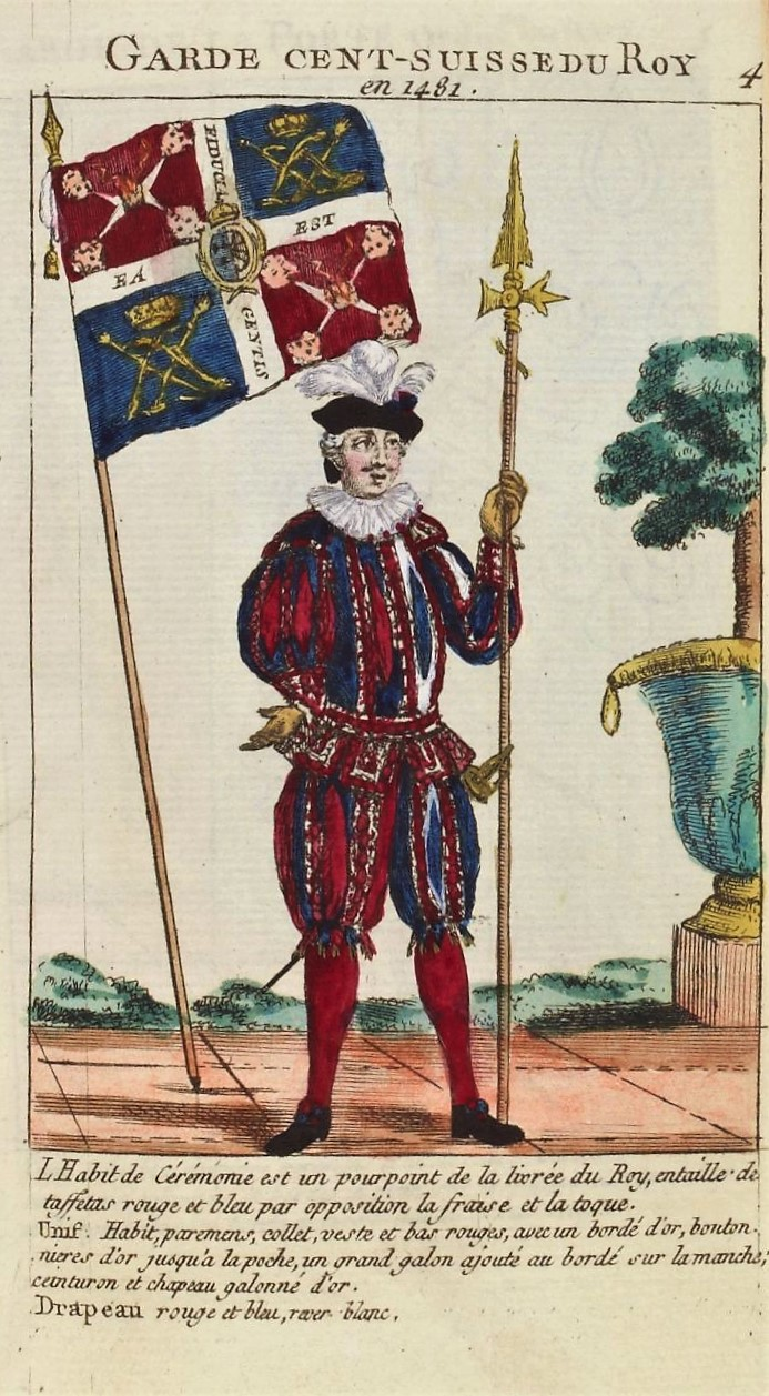 Vue extraite de l'ouvrage de Claude-Antoine Littret de Montigny : Uniformes militaires, où se trouvent gravés en taille-douce les uniformes de la Maison militaire du Roi, publié en 1772.